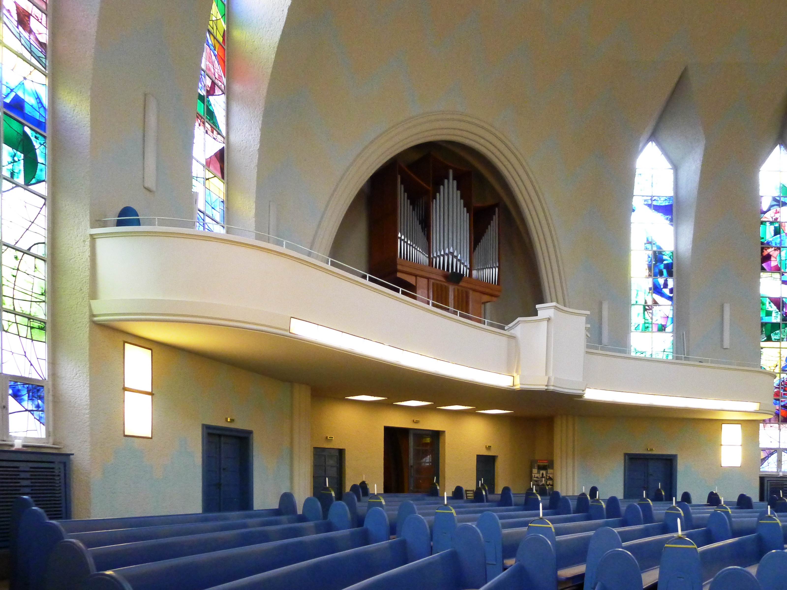 Orgelempore über dem Eingangsbereich zum Kirchenschiff